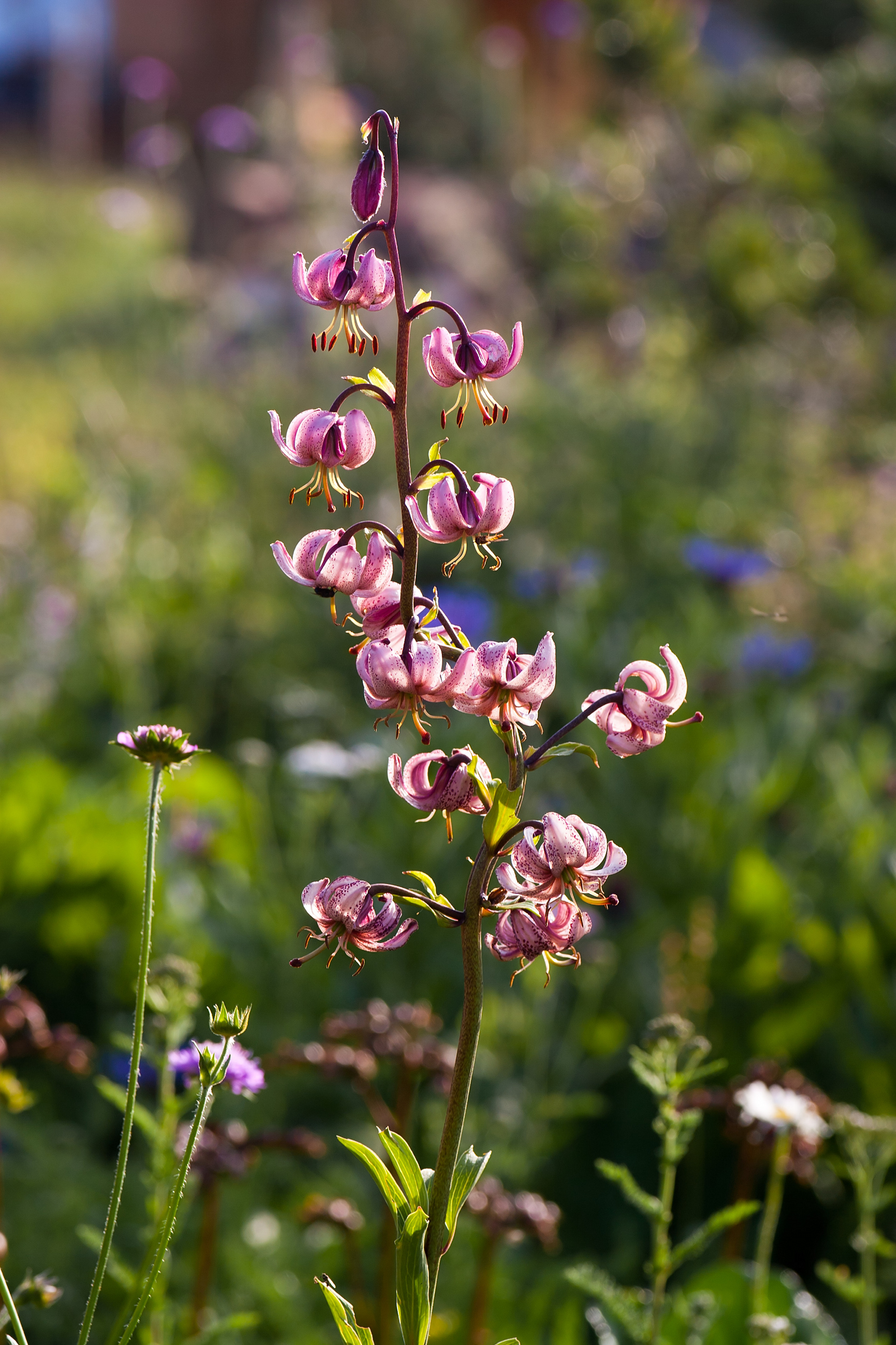 Lilium martagon